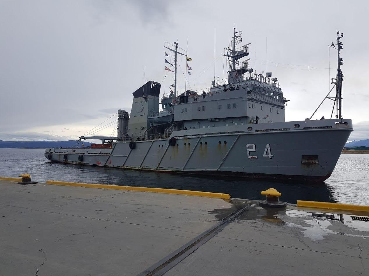 El buque ARA Islas Malvinas de la Armada Argentina brindando asistencia en Comodoro Rivadavia